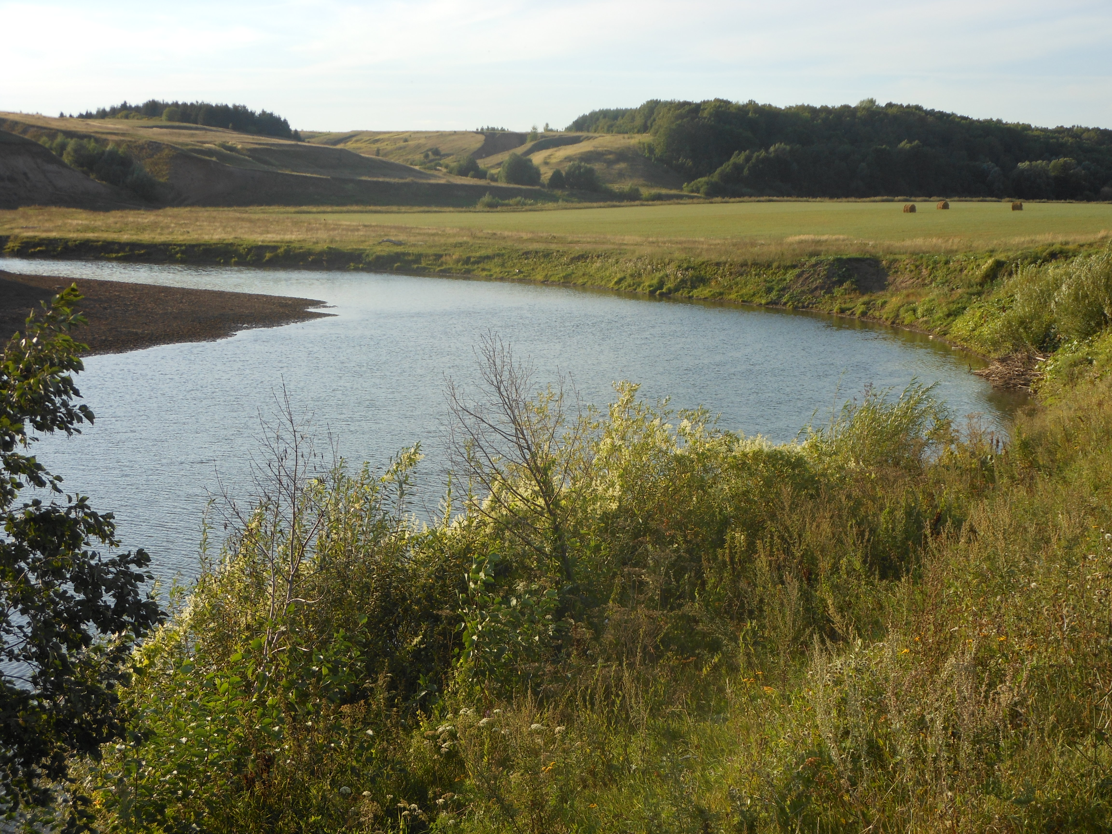 река Цивиль